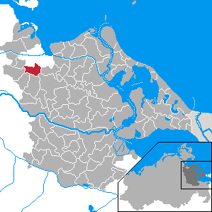 Weitenhagen, Landkreis Ostvorpommern, Mecklenburg-Vorpommern